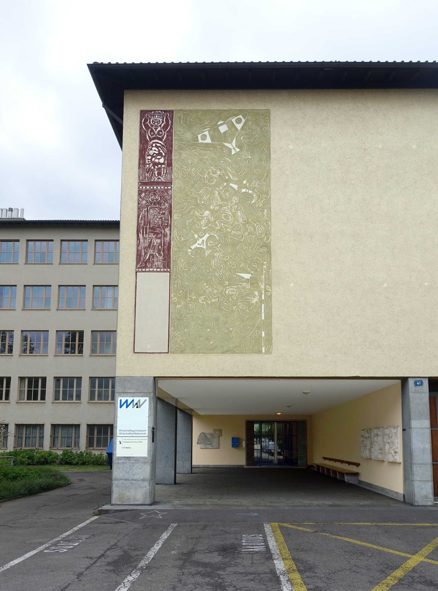 Max Kämpf (1912–1982) Maler und Zeichner. Sgraffito, Das Meer. 1948–1950, an der Fassade des Wirtschaftsgymnasium-Schule in Basel. Auf dem Bildnis war zusätzlich ein Schmied (Allegorie auf das Handwerk) dargestellt (angeblich Stalin gleichend), dieser wurde jedoch nach der sogenannten «Schnauzaffäre» und nach der Weigerung einer Überarbeitung des entsprechenden Details über Nacht weggemeisselt.